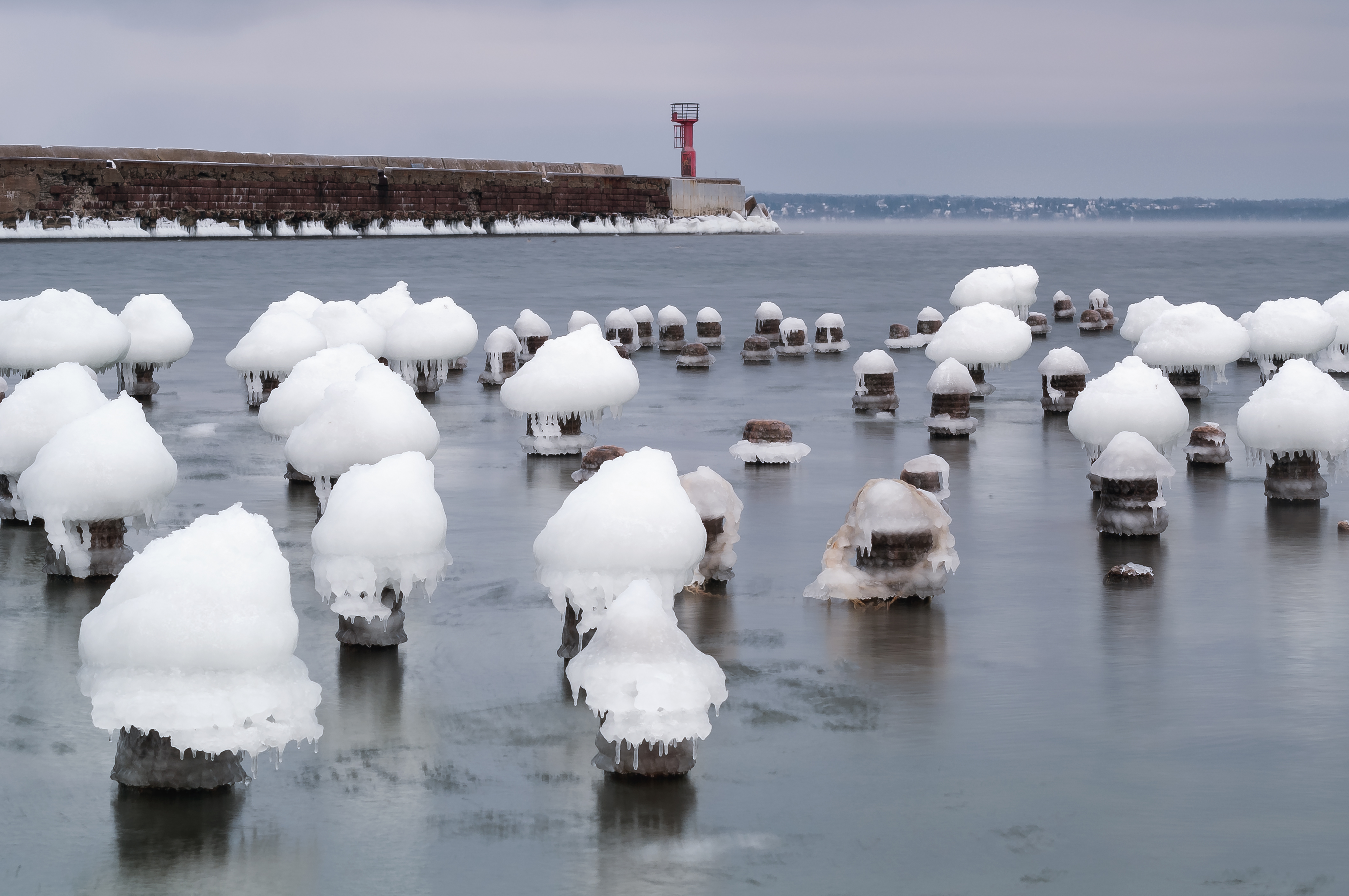 Paljassaare tee, 10313 Tallinn.